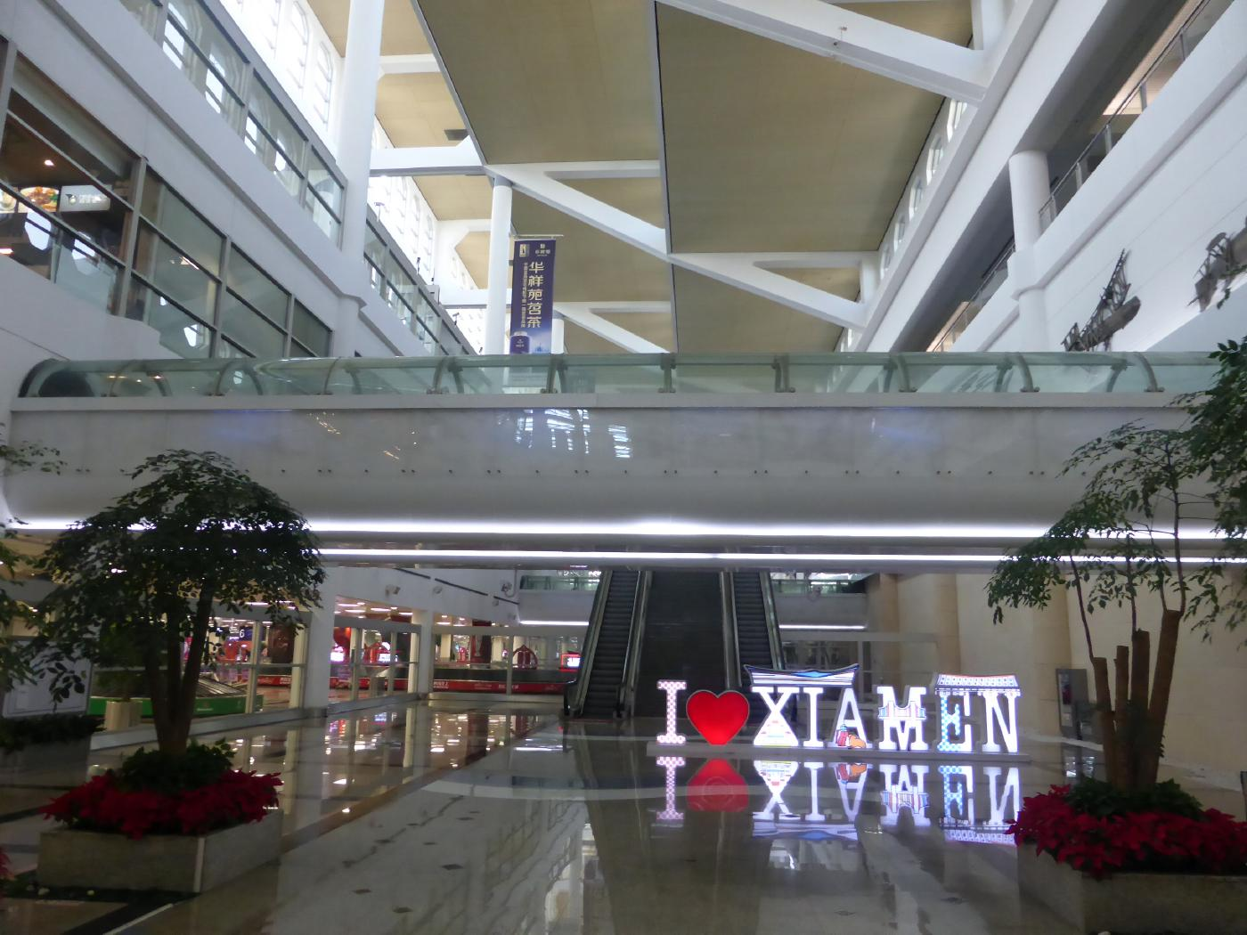 アモイ空港1F到着制限区域内